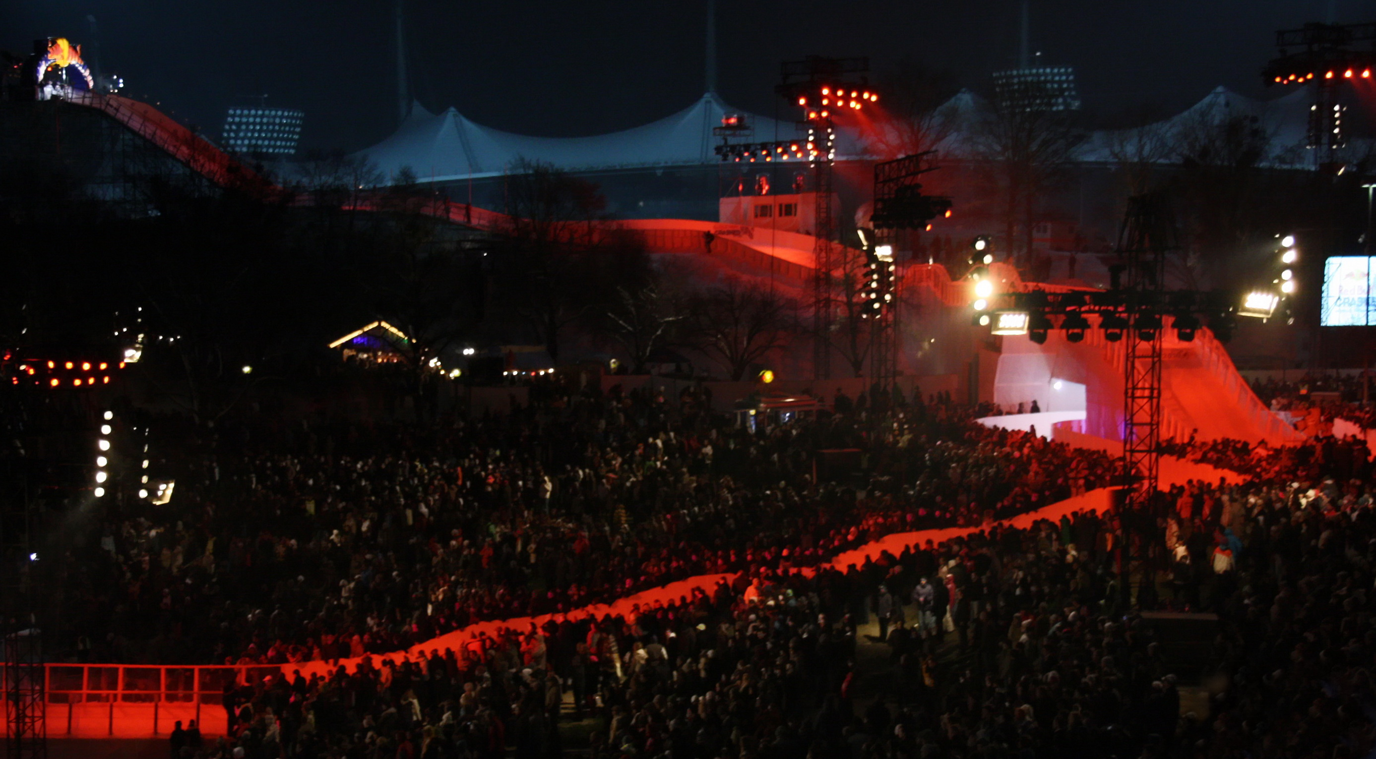 Red Bull Crashed Ice 2010 im Olympiapark München. Strecke mit Startbereich.